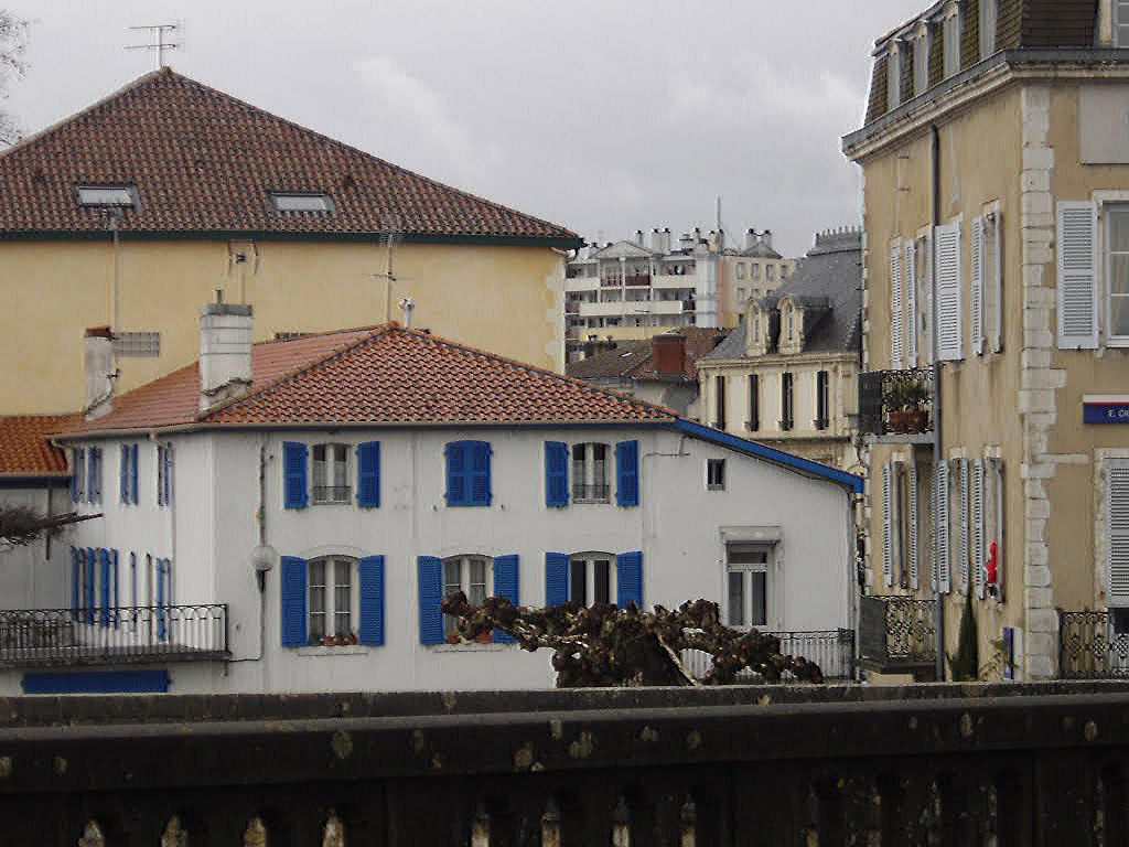 Immeubles historiques du Sablar bordant l'Adour.